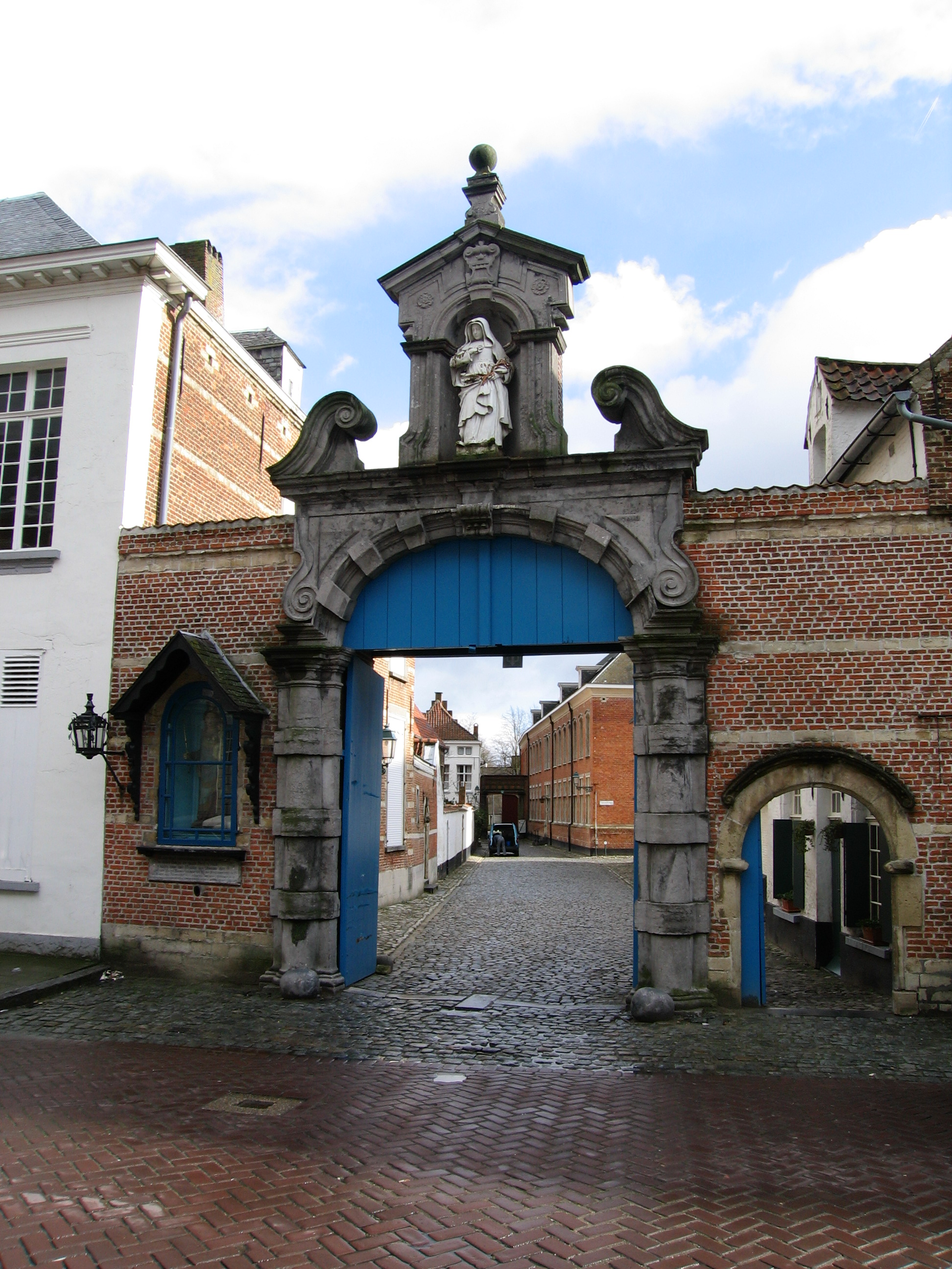 Original description was: Toegangspoort van het Lierse begijnhof Eigen foto